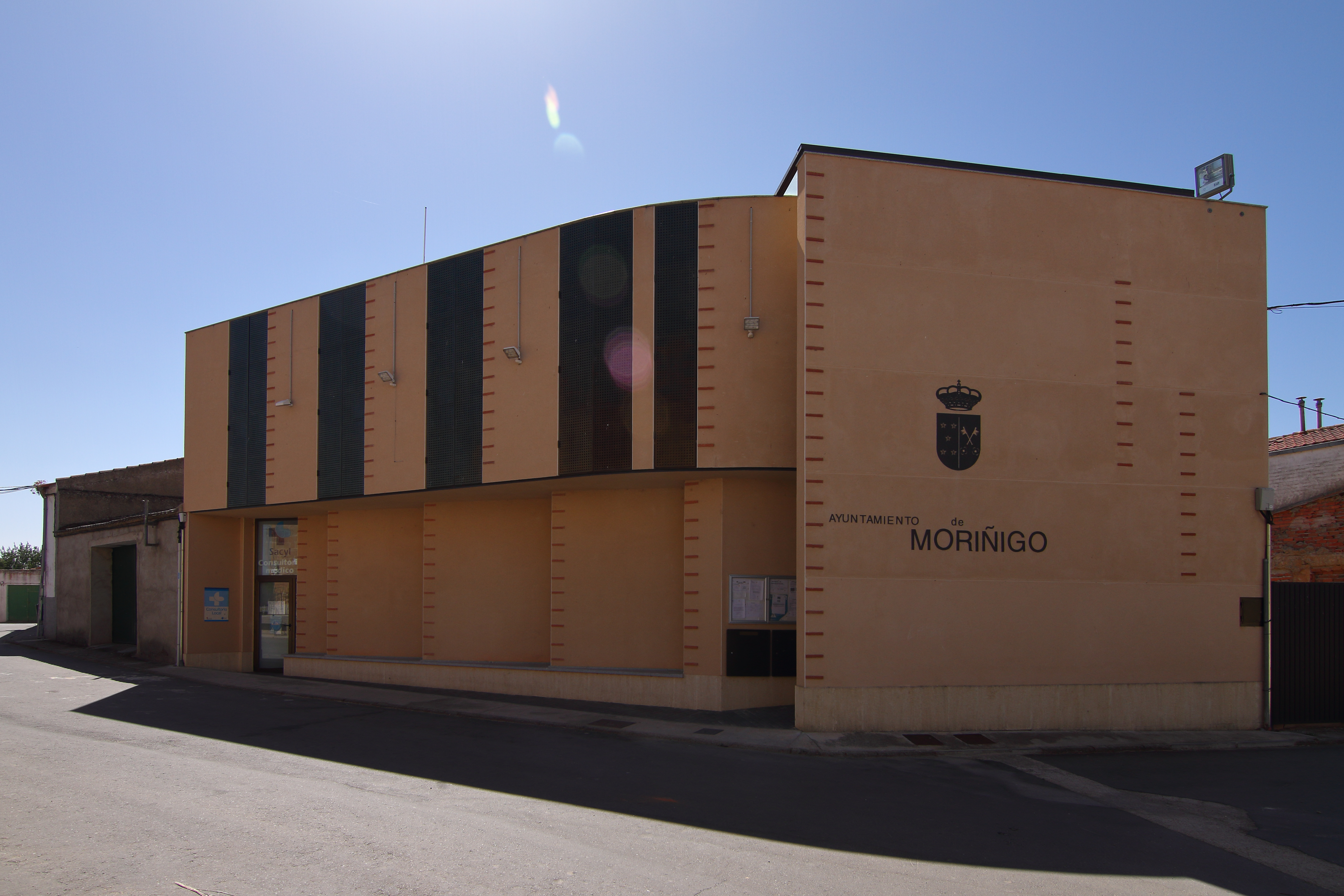 Ayuntamiento de Moriñigo